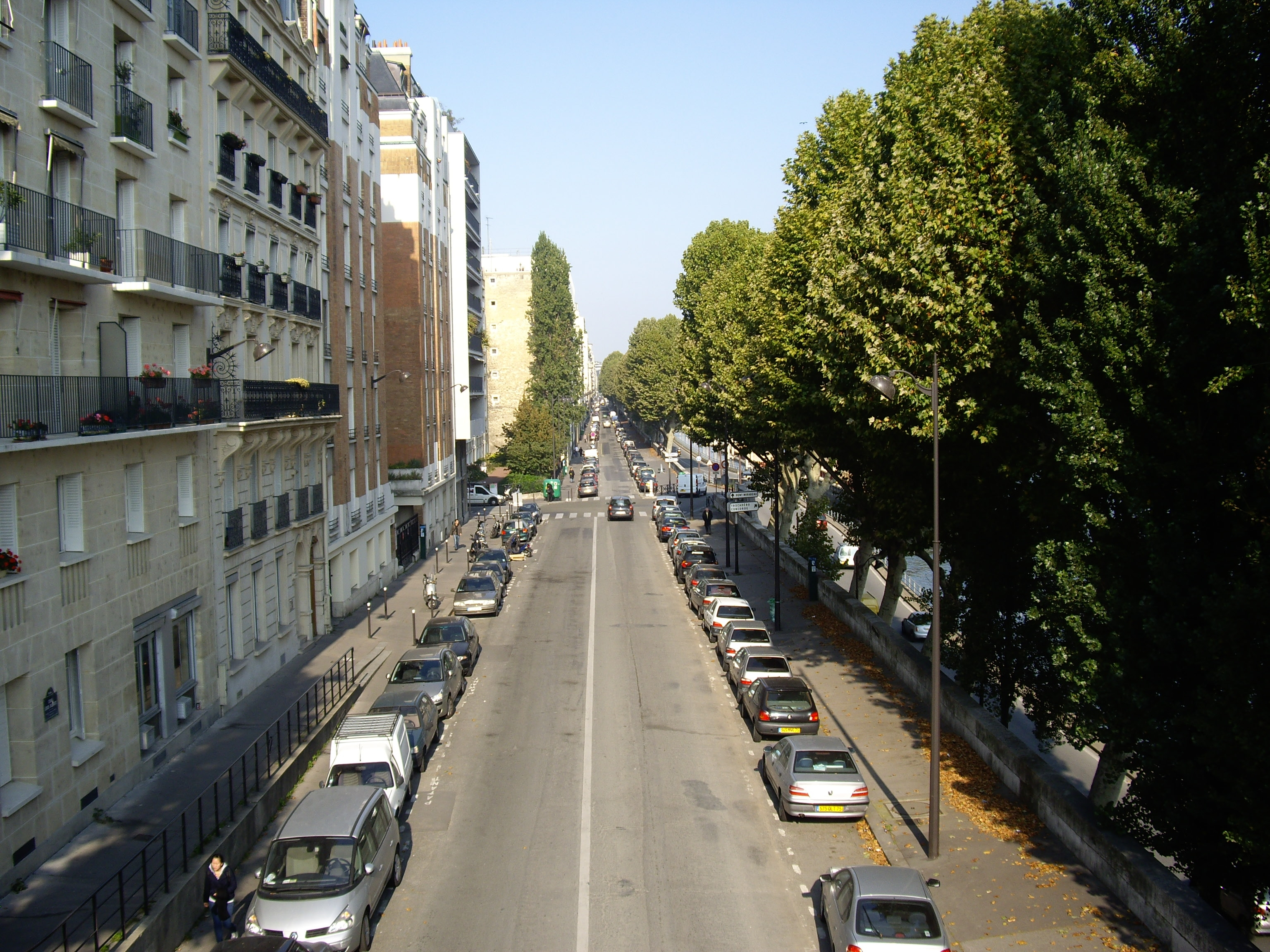 Quai Louis-Blériot, Paris 16e. Vu depuis le pont du Garigliano, vers le pont Mirabeau.